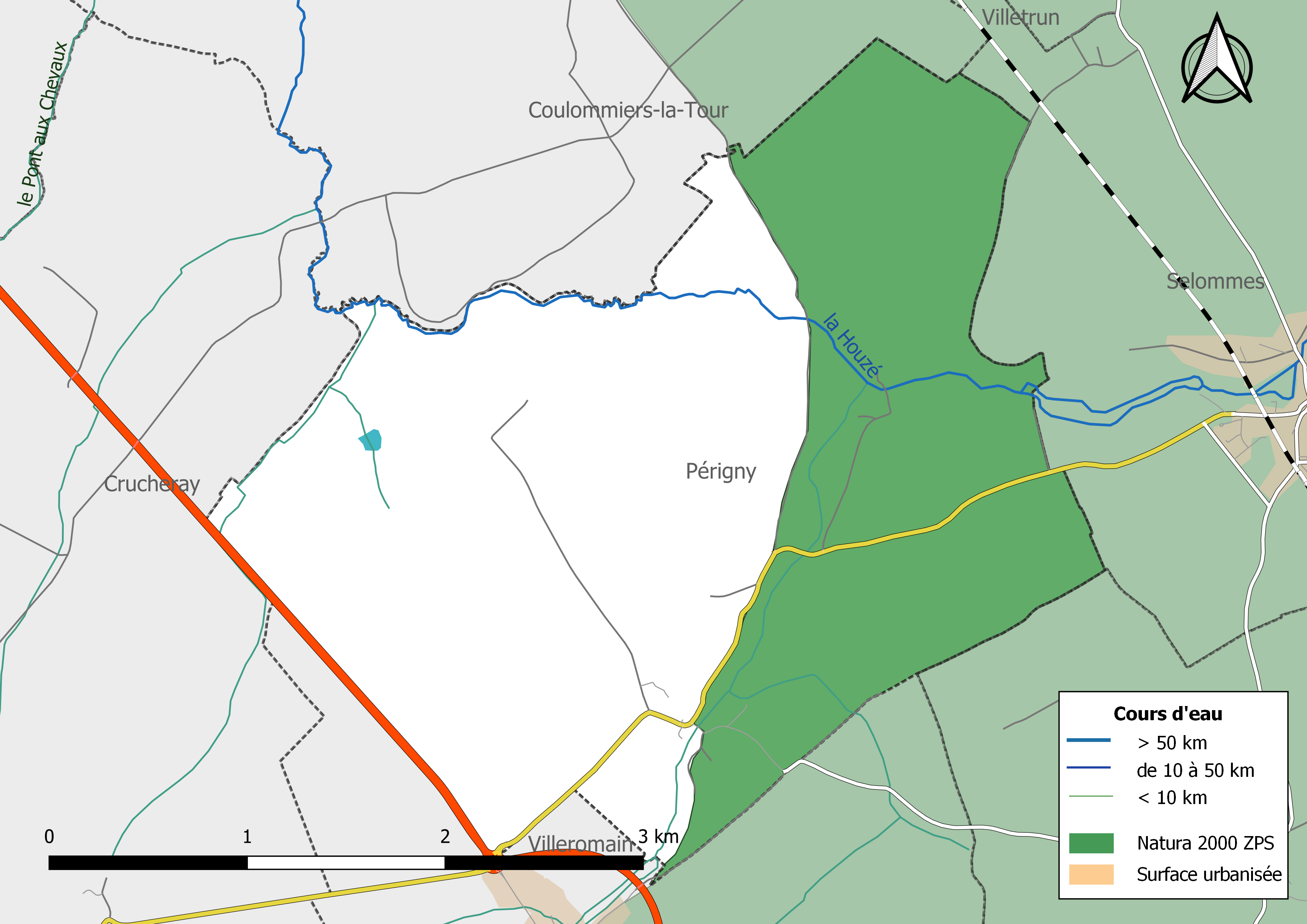 Carte des sites Natura 2000 de type ZPS de la commune de Périgny (France).